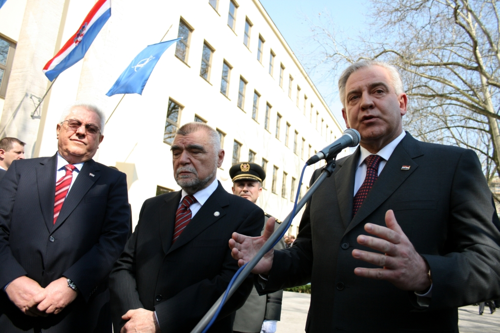 Luka Bebić, Stjepan Mesić i Ivo Sanader na svečanosti podizanja NATO-ve zastave ispred zgrade MORH-a u Zagrebu.